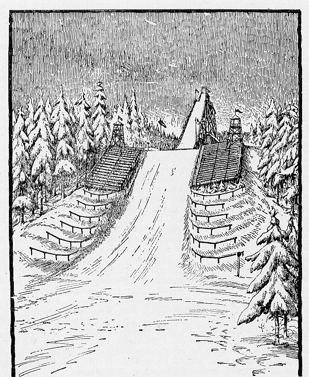 Die ehemalige C. A. Seydel-Schanze am Aschberg